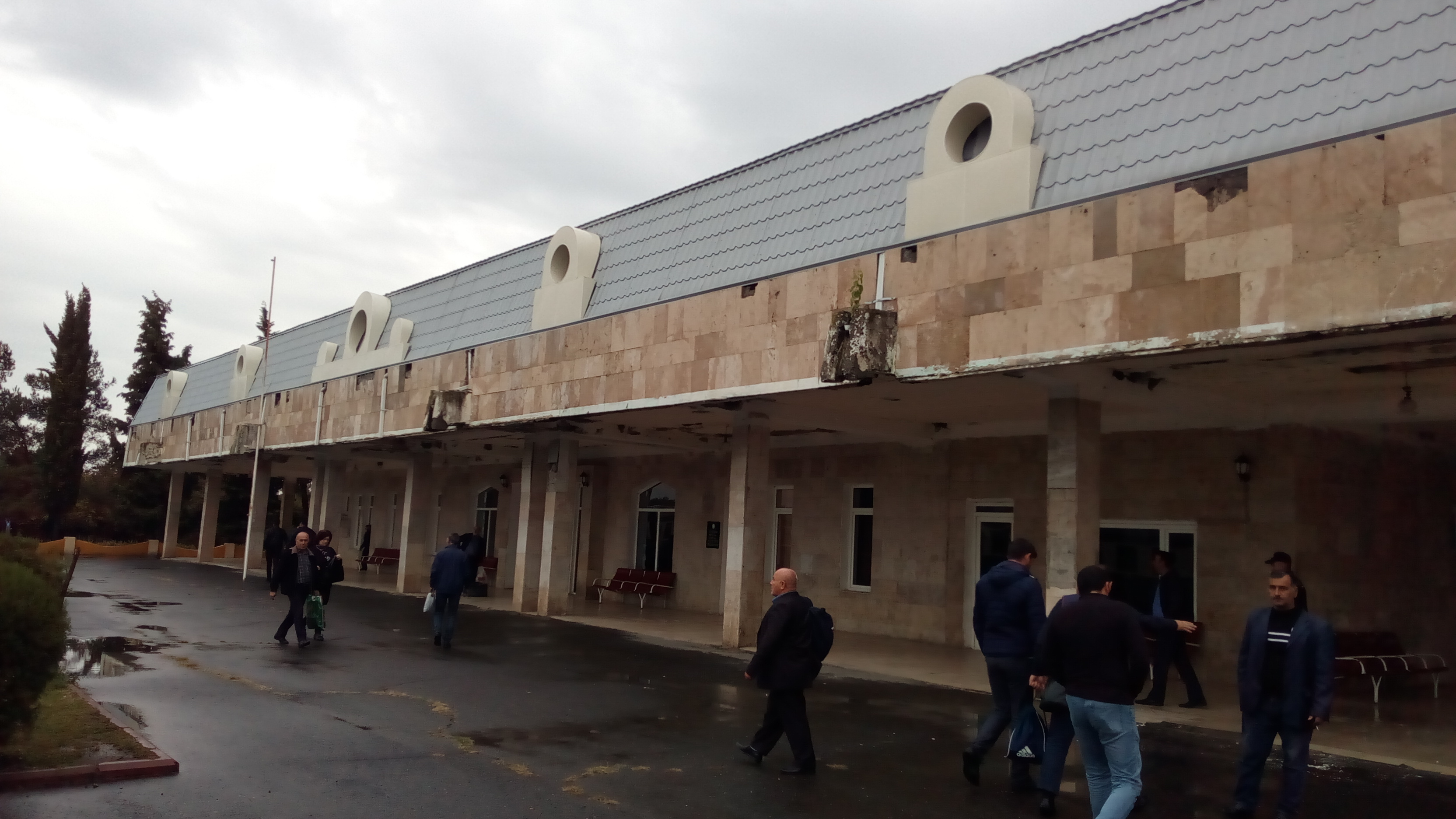 Balakən